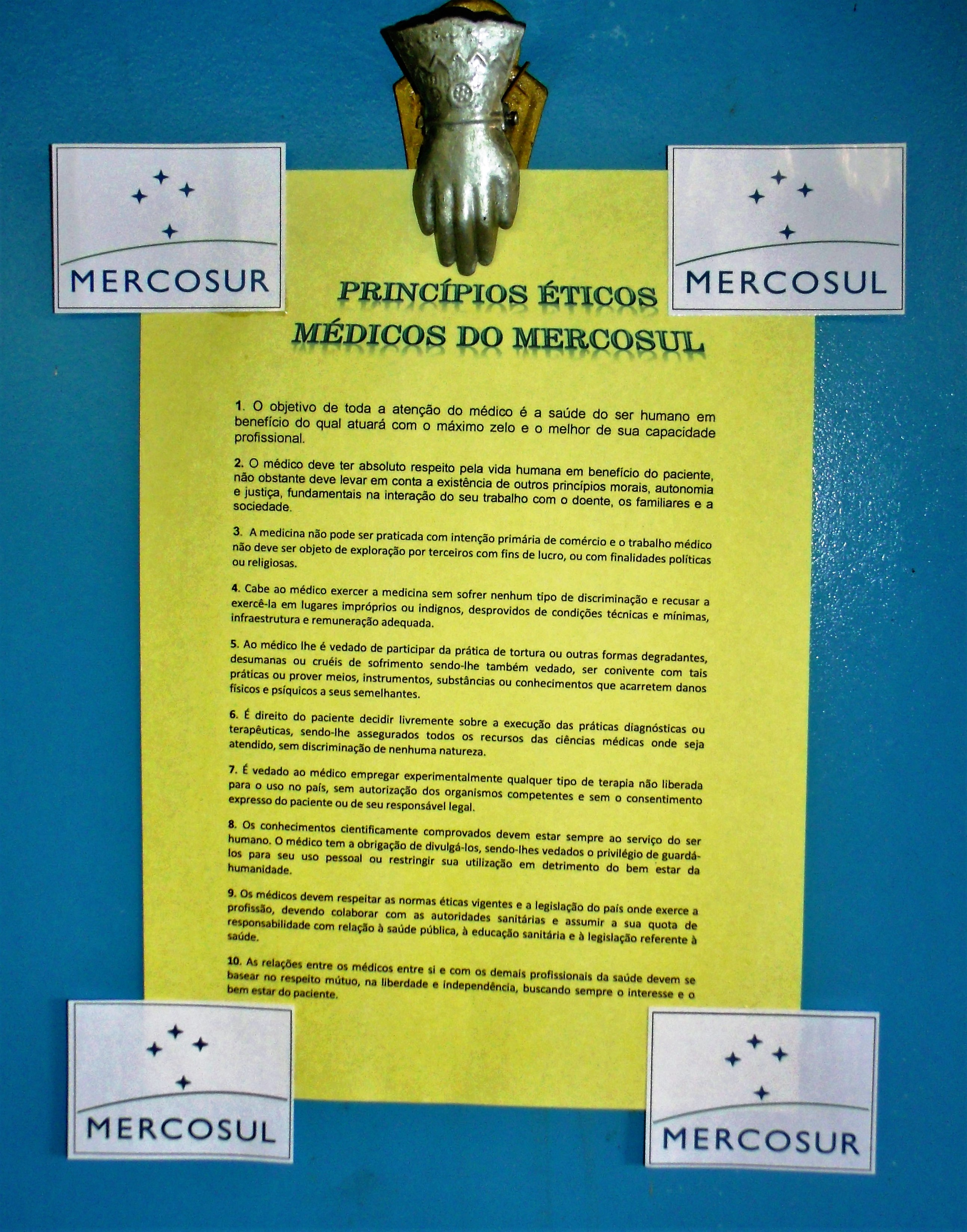 Exposição com a literatura, em língua portuguesa, do Código de princípios éticos médicos do Mercosul.